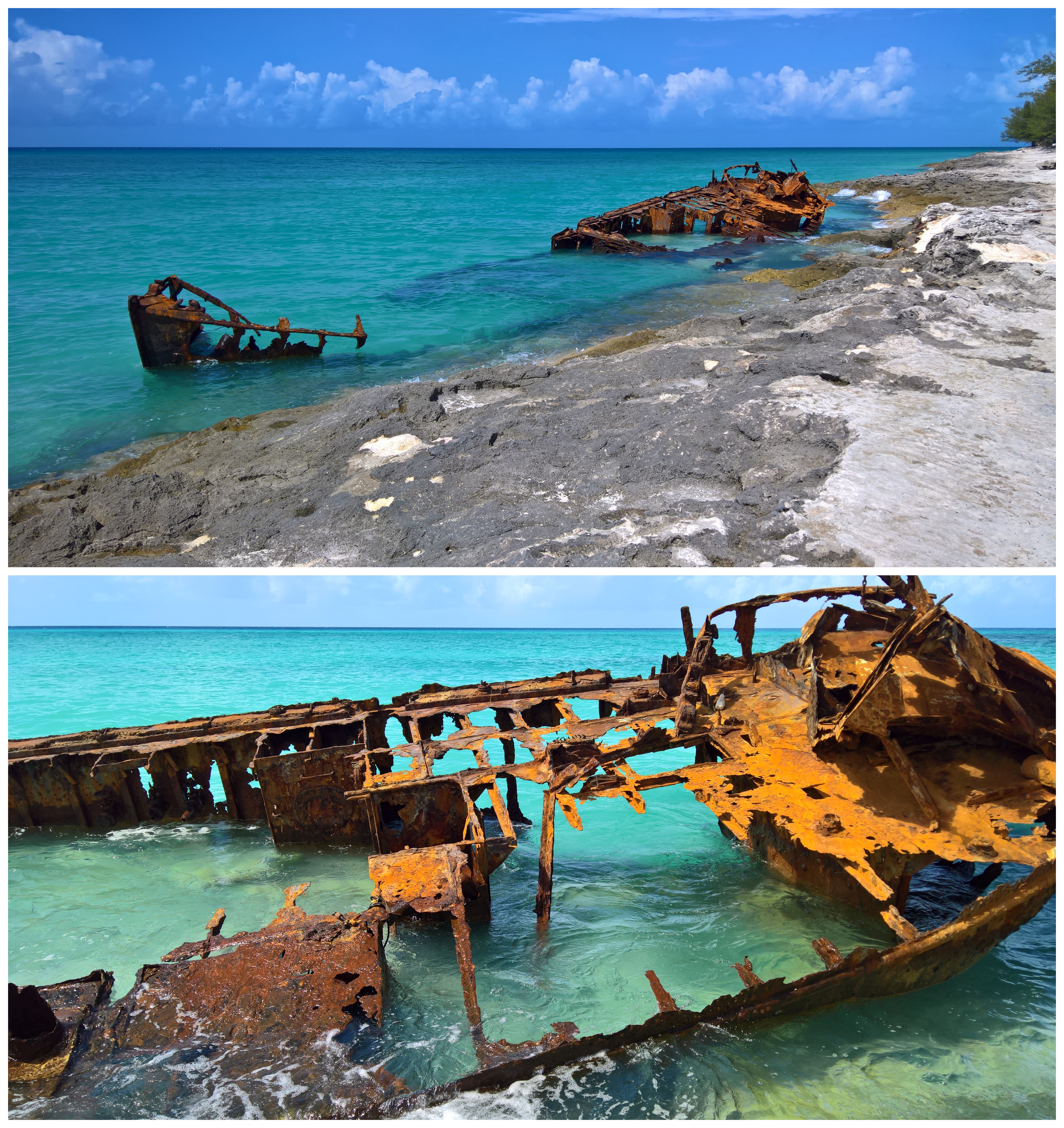 Collage eines Schiffswracks am südlichen Ende von North Bimini (Bahamas)